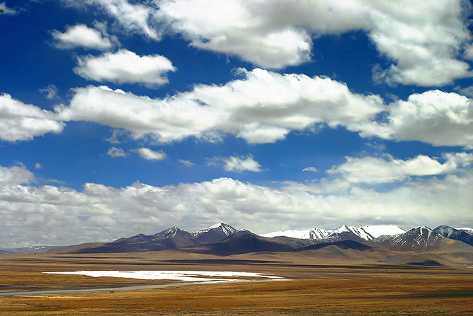 Kunlun mountain, Qinghai, China